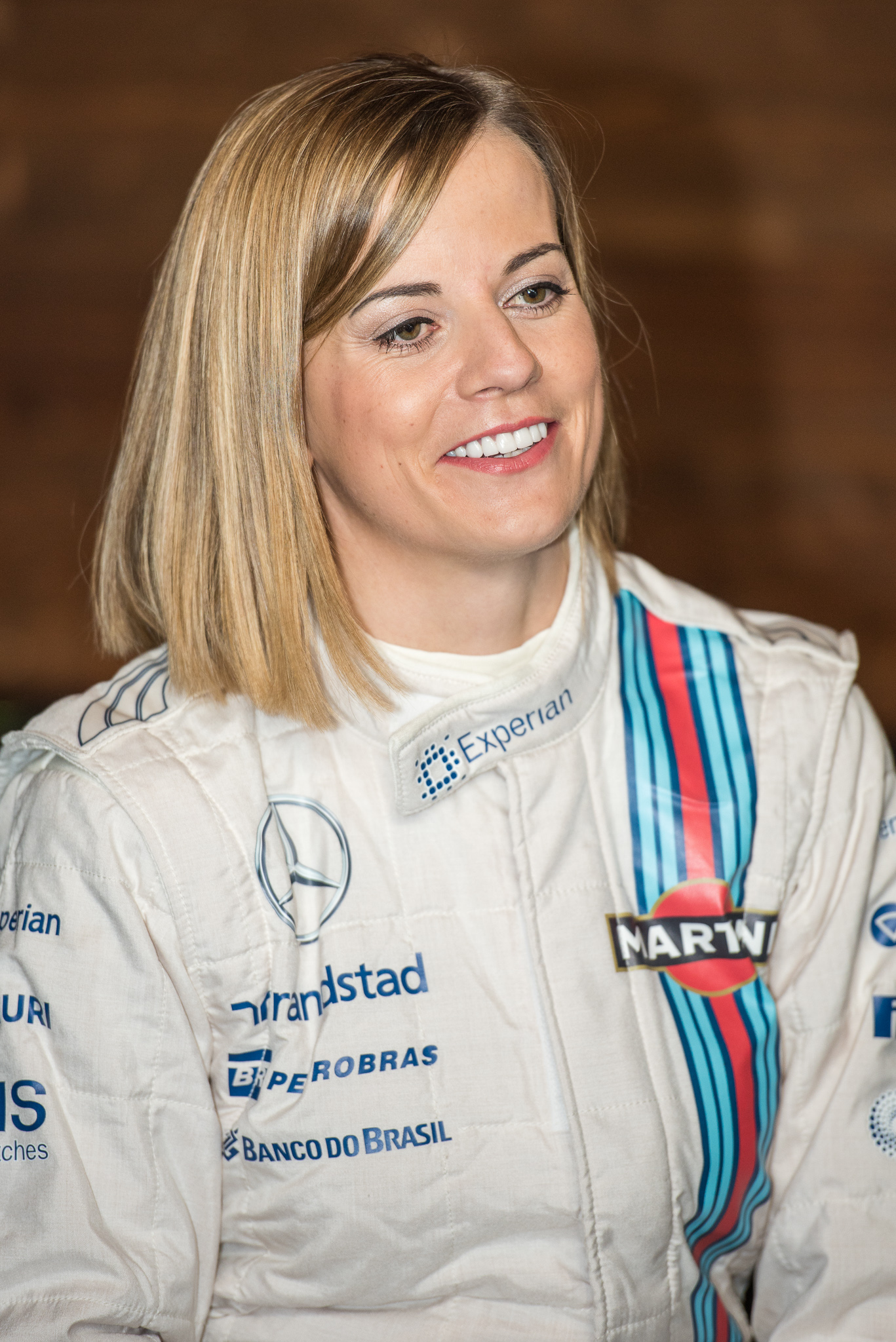 DTM,Deutsche Tourenwagen Masters,Hockenheimring,Motorsport,Susie Stoddart,Susie Wolff